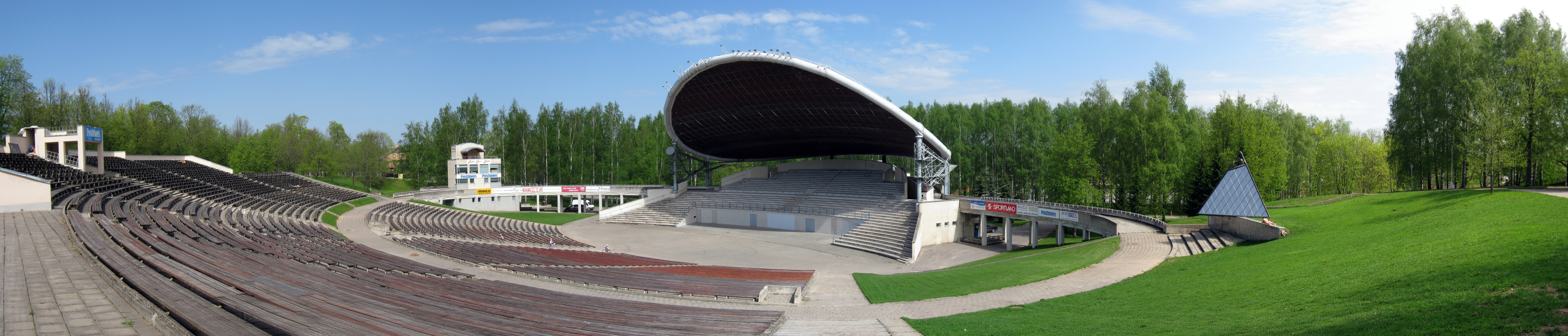 Tartu lauluväljaku panoraam